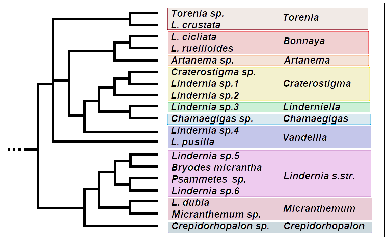 Cladogramma_del_genere Lindernia